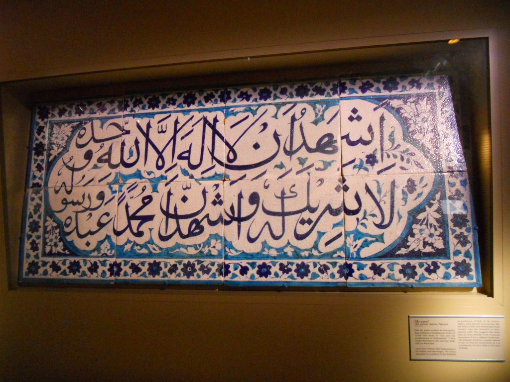 Mosaic - Arabic